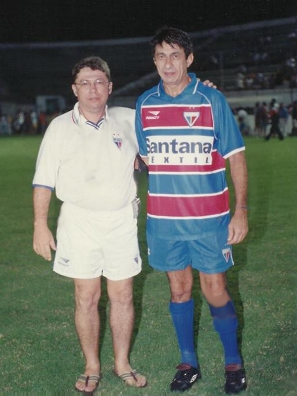 Jogador Fagner